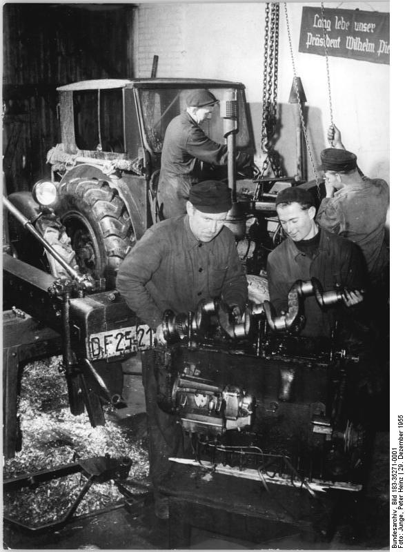 Wittstock, Reparatur eines Motors Zentralbild Junge 29.12.1955 MTS Wittstock schafft 50% des Reparaturprogramms bis zum 31.12.1955 Gute Erfolge bei der Winterreparatur erreichte bisher die MTS Wittstock, Bez. Potsdam, die vor etwa einem Monat alle Maschinen- und Traktorenstationen der Republik zu einem Wettbewerb zur vorfristigen Beendigung des Winterreparaturprogramms aufrief. In ihrem Kampfprogramm hat sich die MTS das Ziel gesetzt, alle Geräte und Maschinen für die Frühjahrsbestellung bis zum 31.1.56 100%ig einsatzfähig zu machen und bis zum 15.2.56 50% aller Erntebergungsmaschinen zu reparieren. Die Station wird auch dafür sorgen, dass alle Maschinen und Geräte der LPG ihres Bereiches bis zum 15.2.56 einsatzfähig sind. UBz: Die Reparaturbrigaden der MTS Wittstock stehen untereinander im Wettbewerb. - Im Vordergrund (von links nach rechts): Die Schlosser Erich Nickel und Werner Runge von der Traktoren-Reparaturbrigade "Roter Partisan" reparieren den Motor eines Traktors.